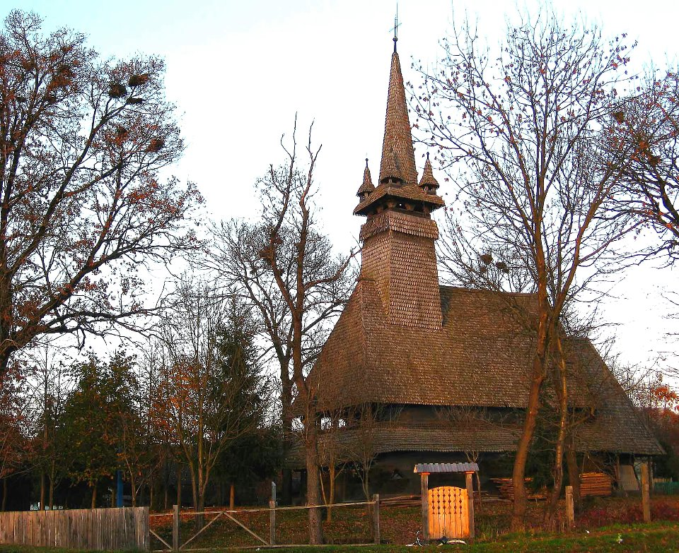 Церква Святого Миколи Чудотворця (Сокирниця)